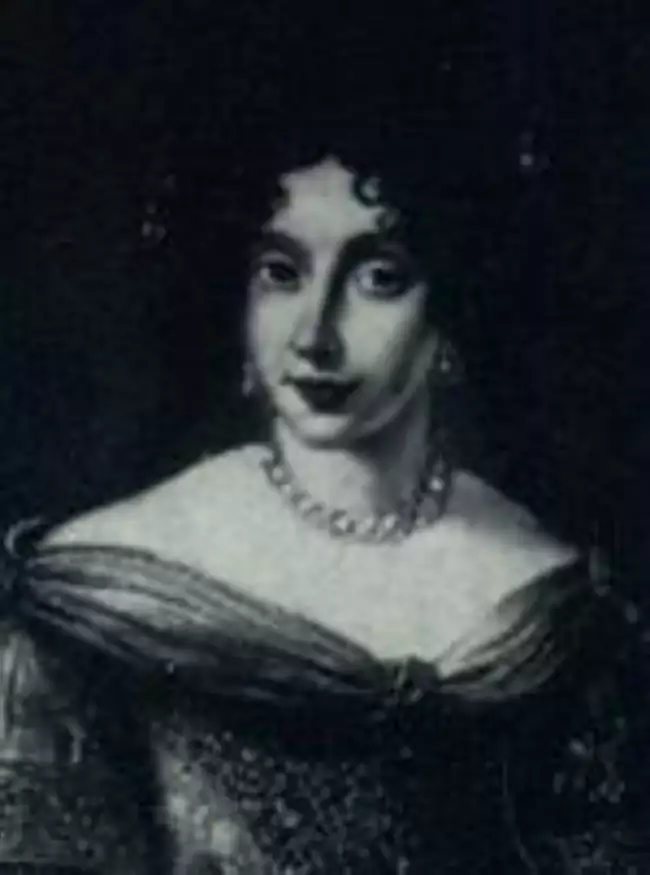 Ritratto dela Duchessa di Guastalla Margherita d'Este, consorte di Ferrante III Gonzaga